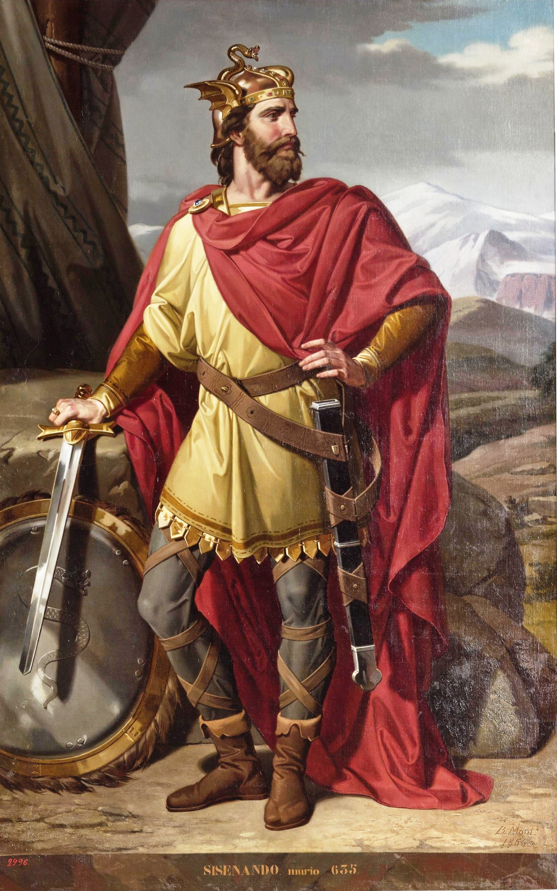 Retrato imaginario del rey visigodo Sisenando († 636), que sucedió en el trono a Suintila y fue sucedido a su vez por el rey Chintila.